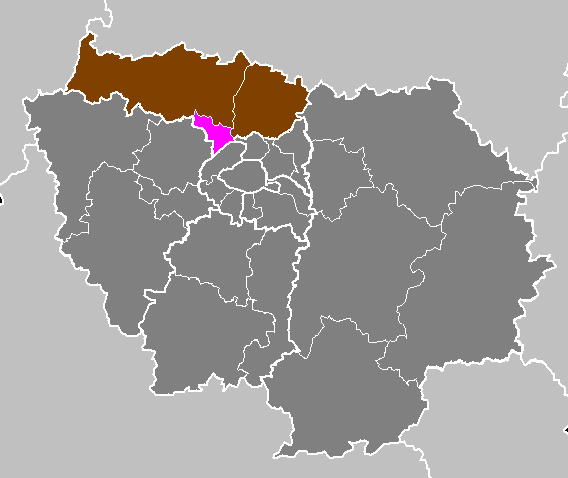 Maps of arrondissements and cantons of France: Département du Val-d Oise - Arrondissement d Argenteuil.PNG (Région Île-de-France)